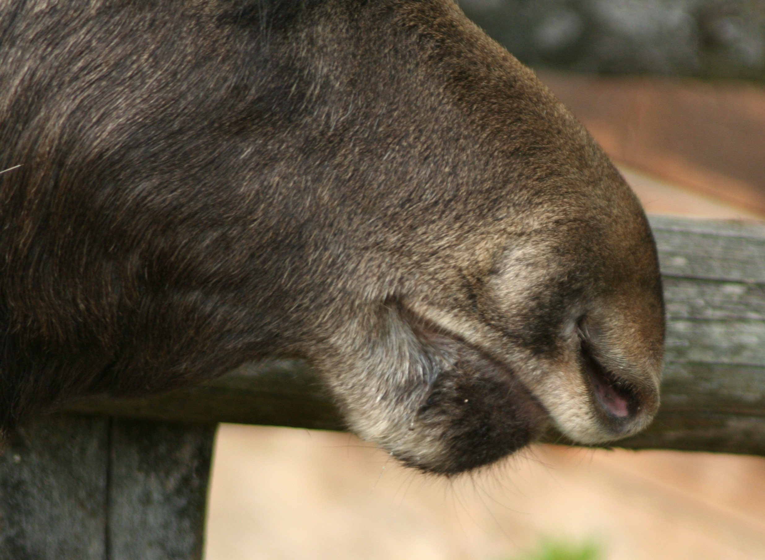 Alces_alces